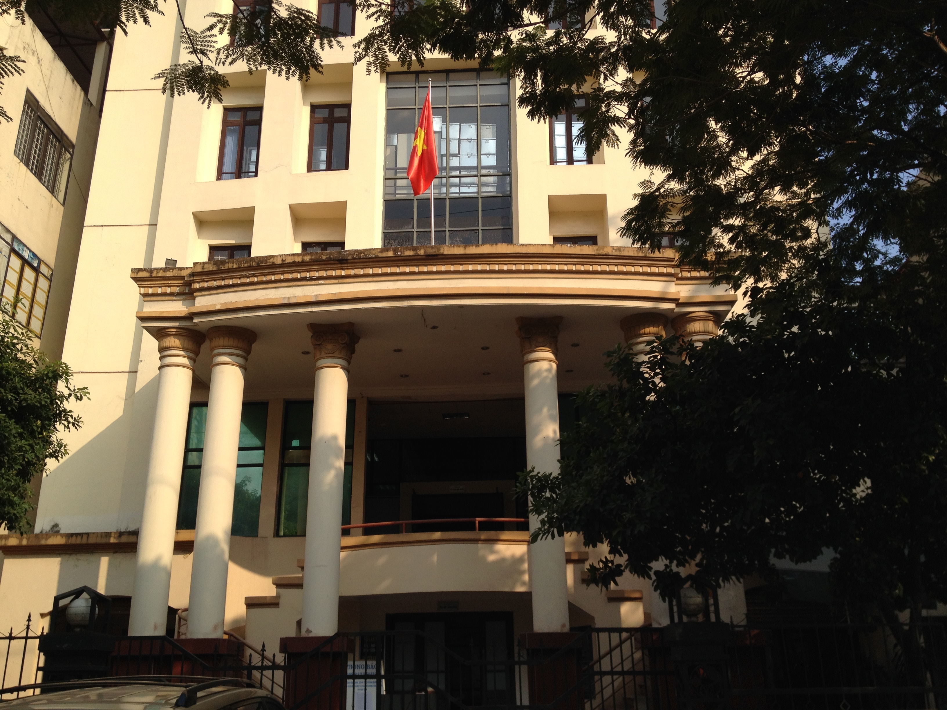 Hà Nội, Việt Nam.